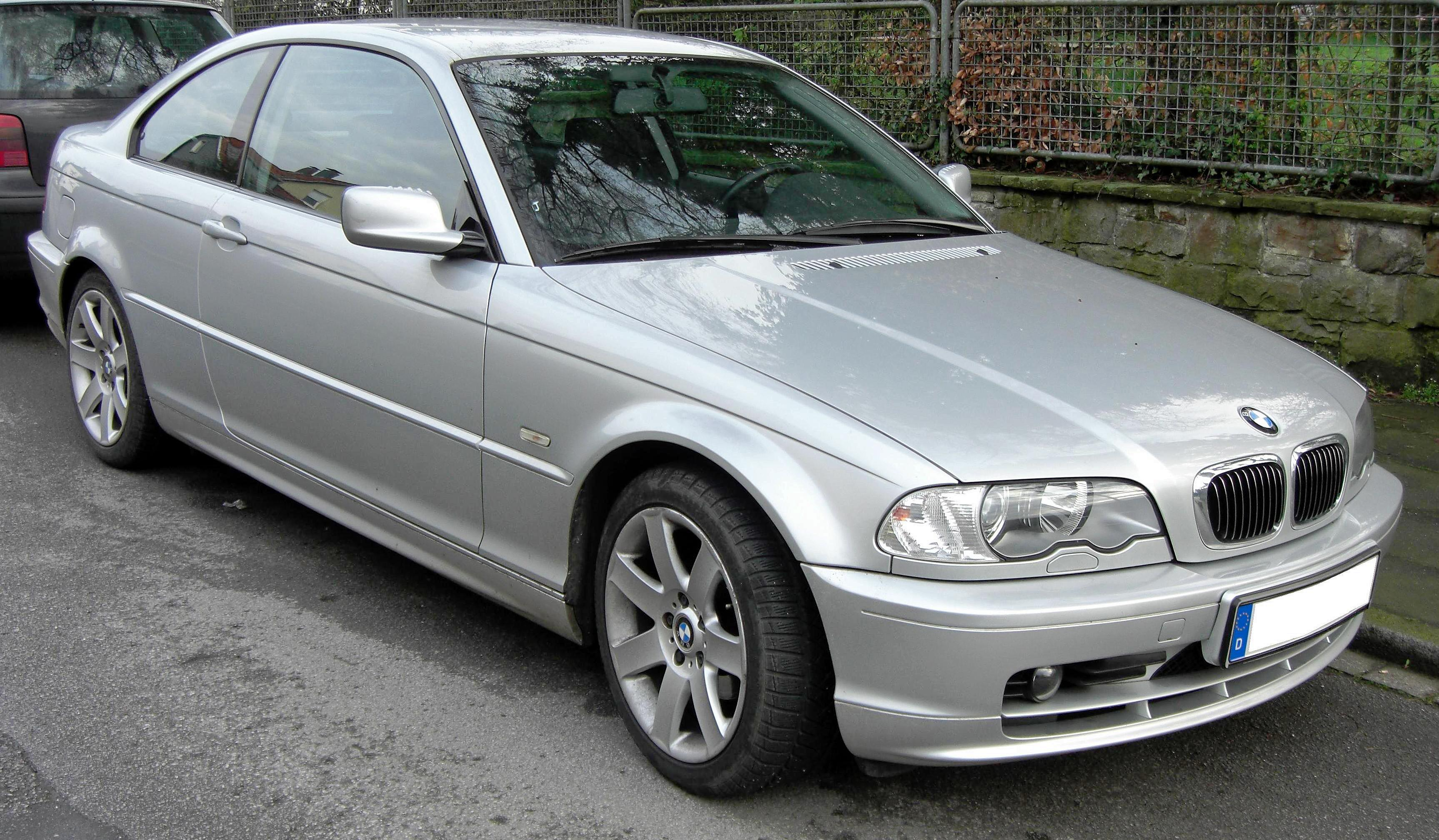 BMW 3er Coupé